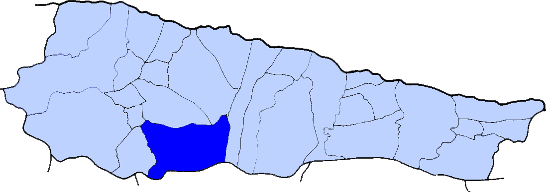 Localización de Caldueño en el Municipio de Llanes